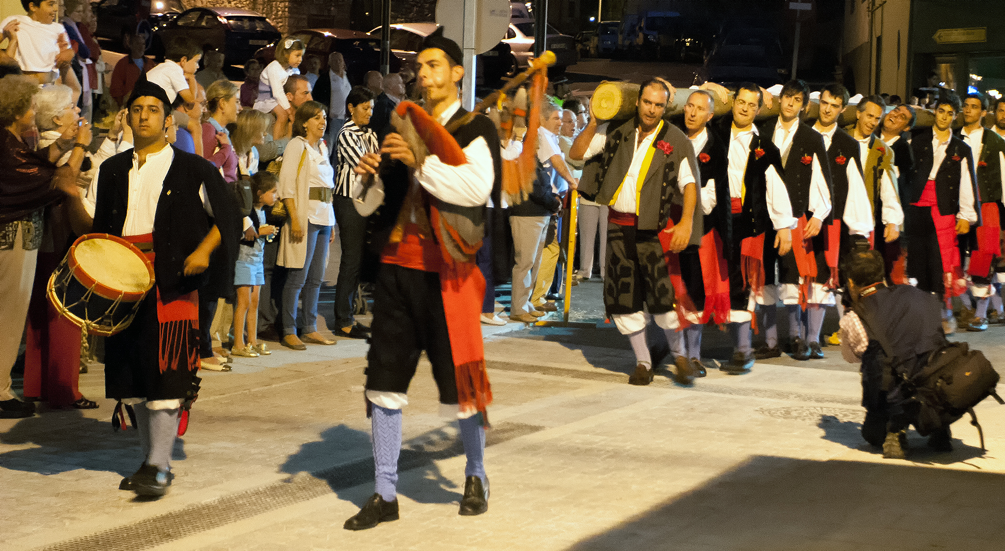 Un momento del traslado del eucalipto a la plaza donde está situada la Iglesia de Santa María Magdalena, en la villa de Llanes. El árbol servirá, posteriormente, para hacer la hoguera; alrededor de la misma se bailará la Danza Prima. This is a photography of a Folklore festival in Spain (Wikidata id Q23657396).